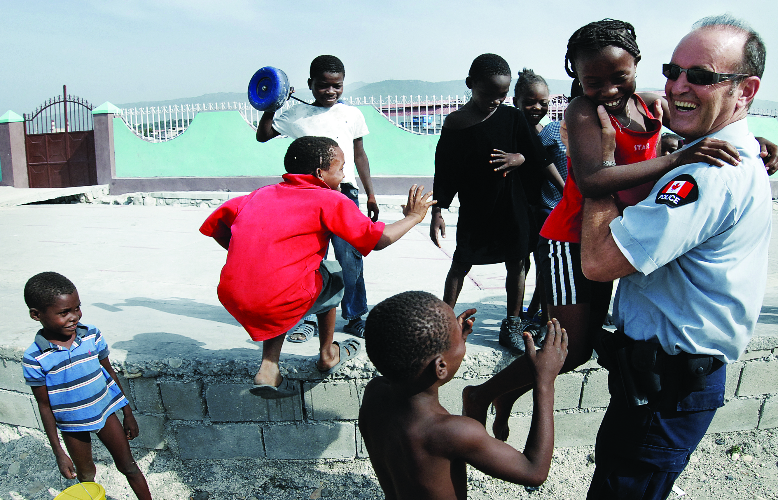 haiti